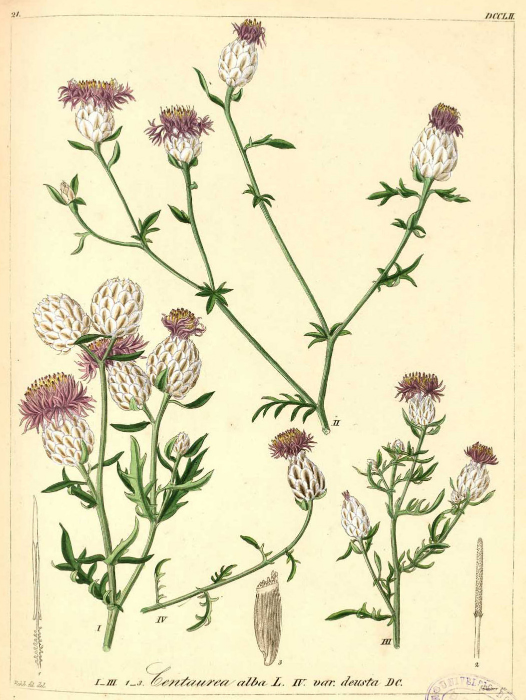 Centaurea alba